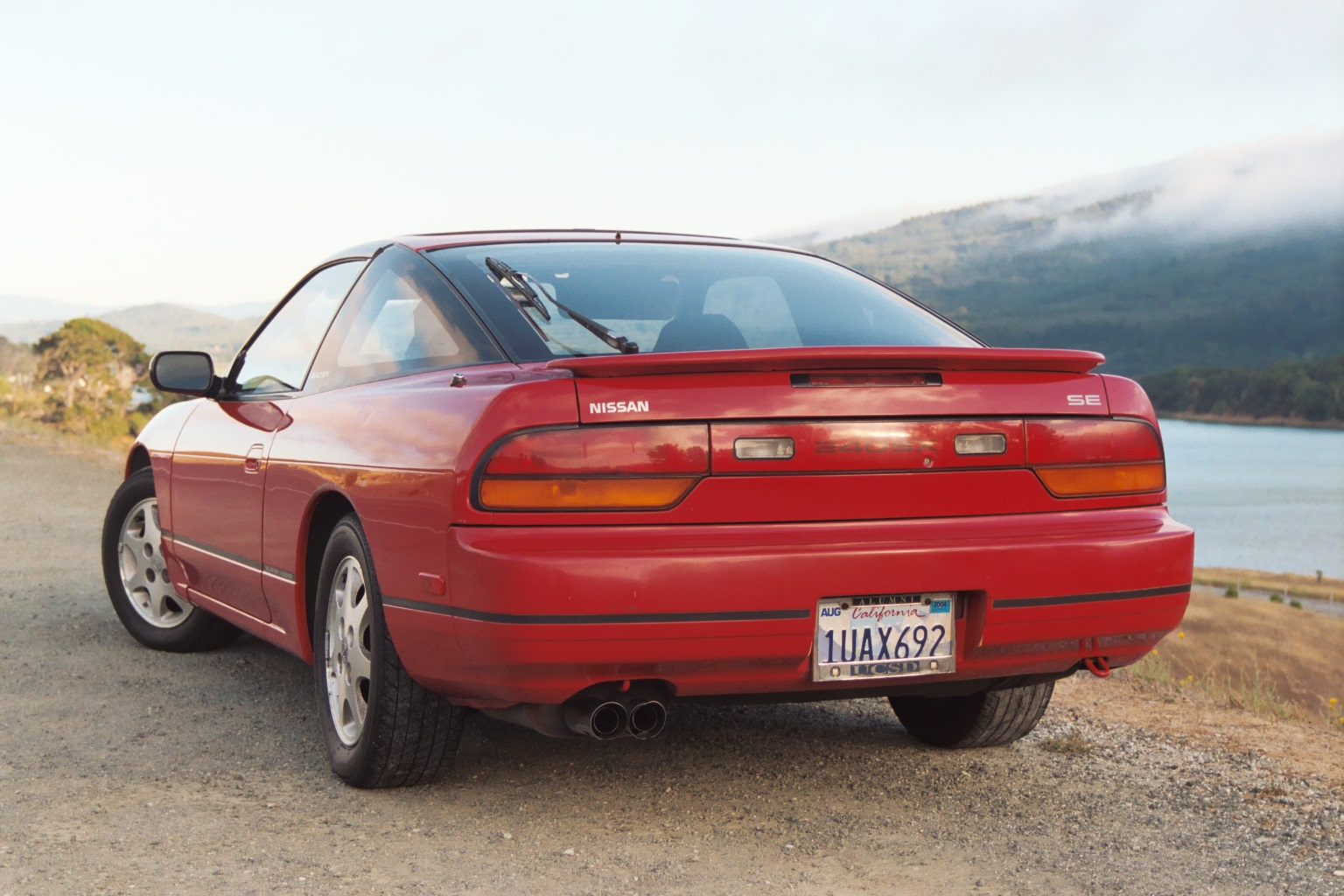 Nissan 240SX rear view008_5A